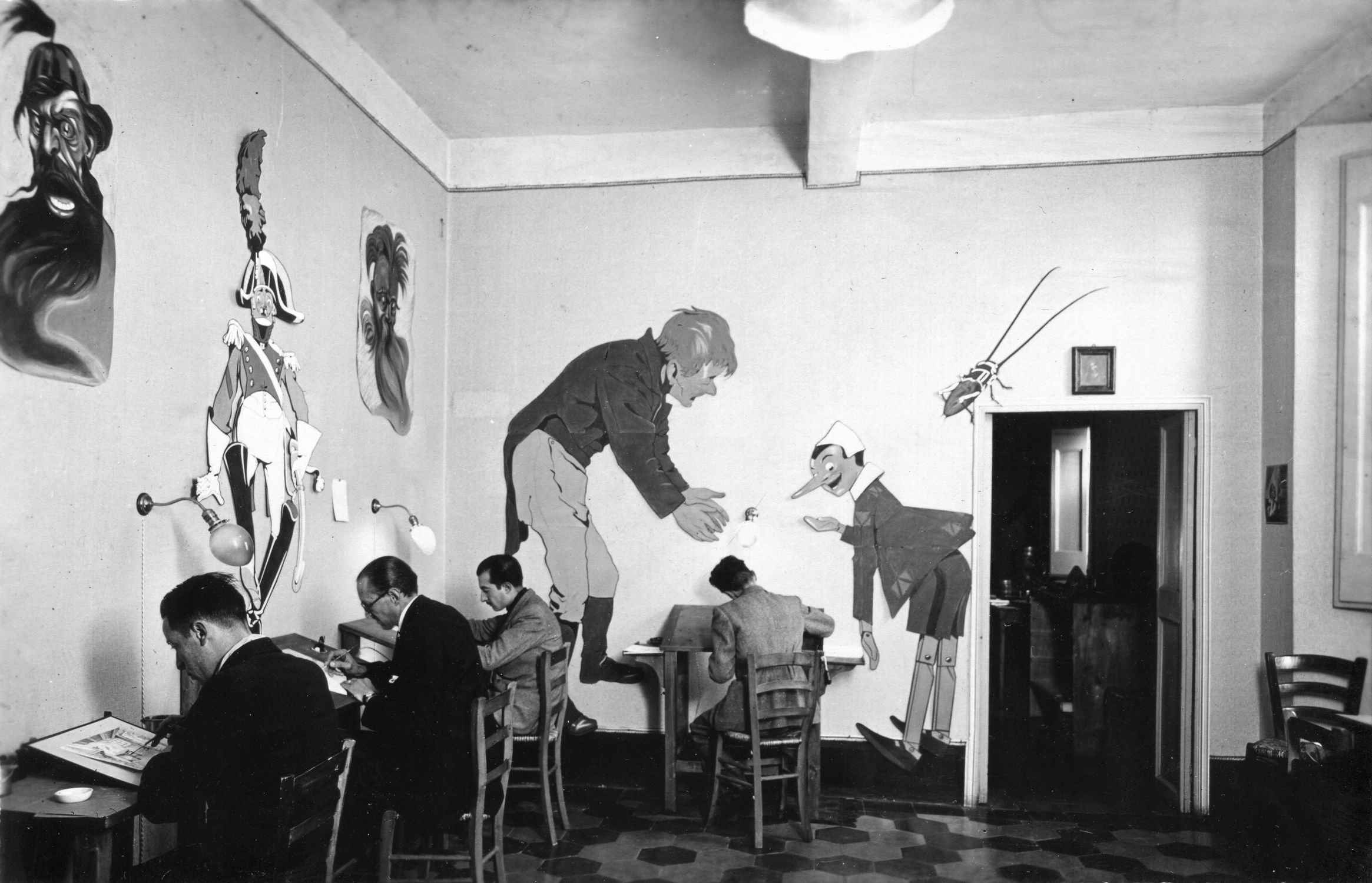 Gli animatori e gli scenografi de "Le Avventure di Pinocchio" negli studi CAIR nel 1935.